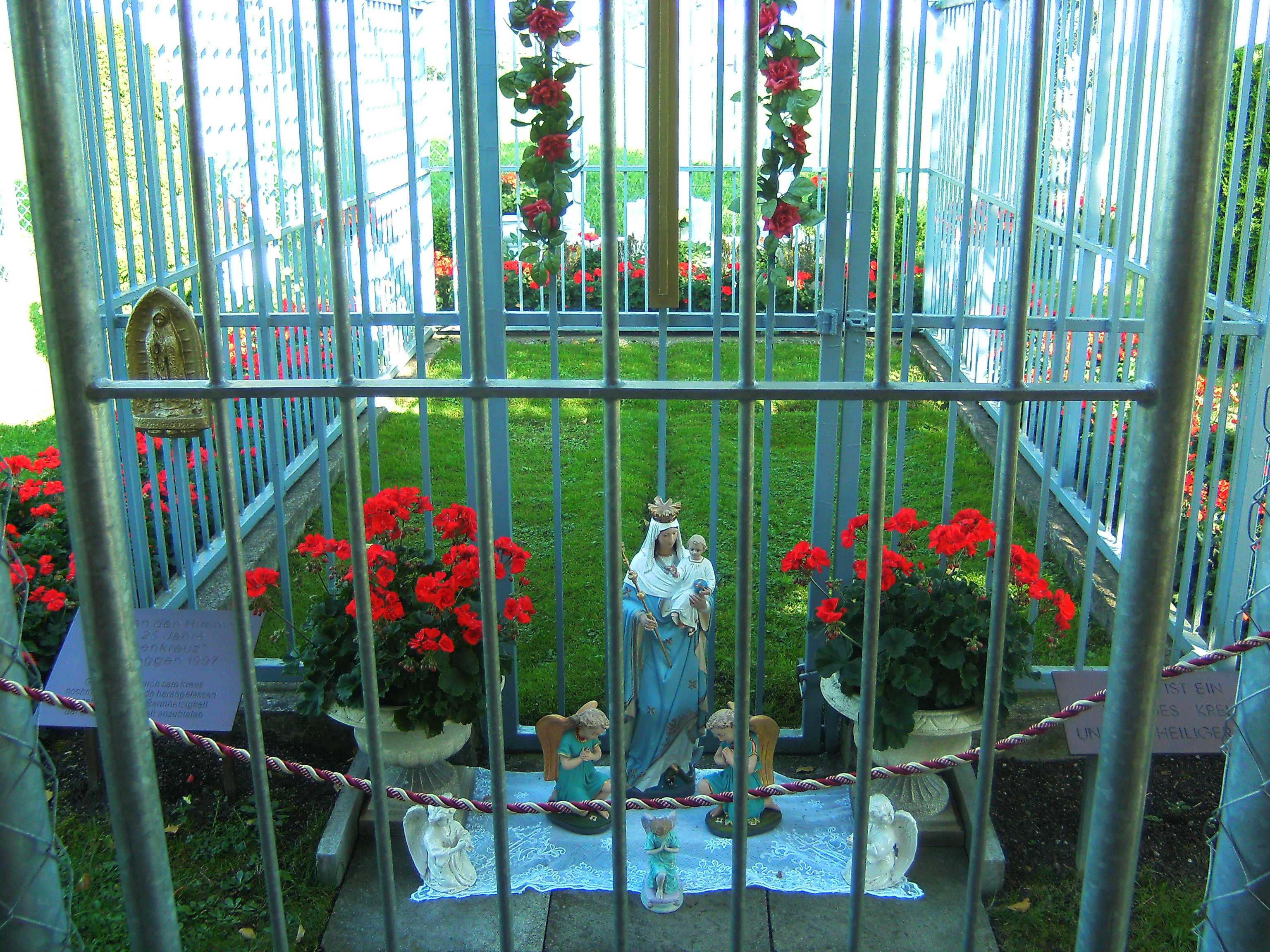 Angebl. Rasenkreuz bei Meggen